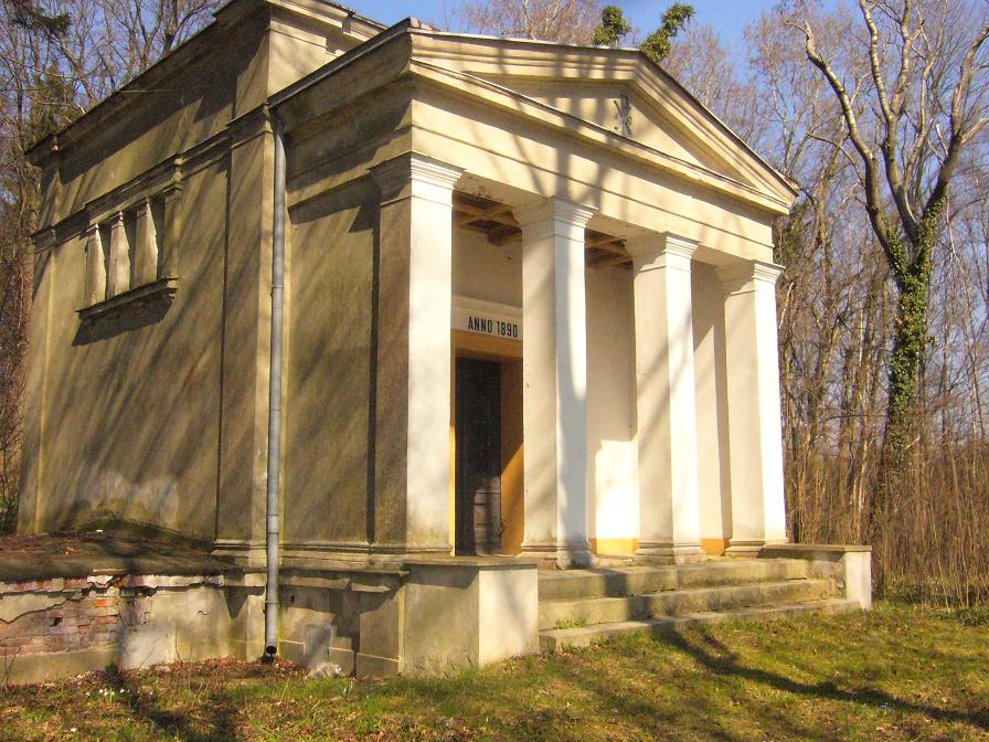 Kaplica na nowym cmentarzu w Salinie